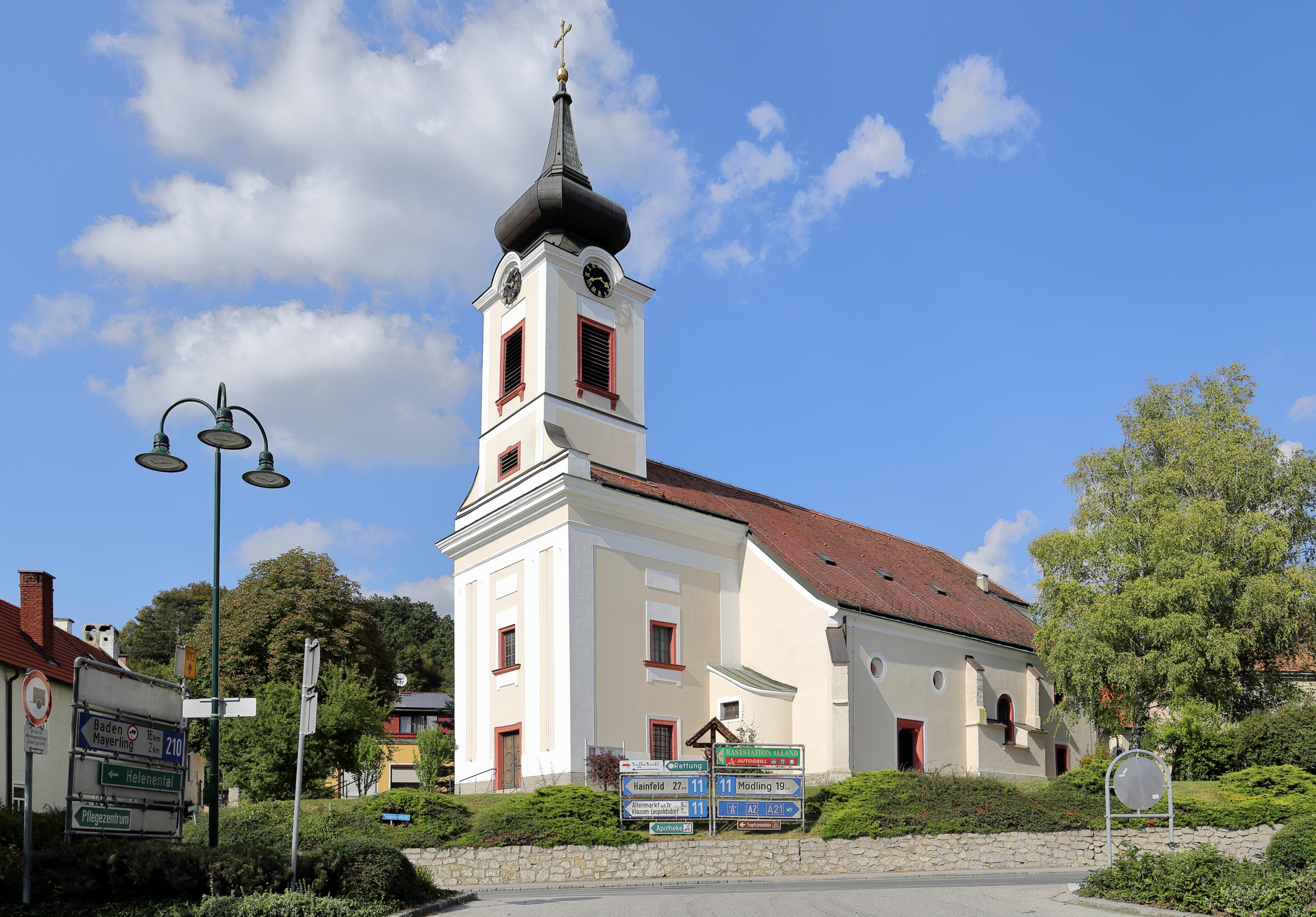 Südansicht der röm.-kath. Pfarrkirche hll. Georg und Margarethe der niederösterreichischen Gemeinde Alland.Ursprünglich eine romanische Saalkirche. Im 12. Jahrhundert wurde diese um ein Nordschiff und einen Westturm erweitert. Im 14. Jahrhundert erfolgte der Anbau einer Südostkapelle, die Einwölbung des Nordschiffes sowie der Neubau des Chores. Um 1500 Zubau eines 2. südlichen Seitenschiffjoches und des Südportales. Um 1800 Neubau der oberen Geschosse des Turmes und Barockisierung der Fassade. Im Zuge der Kriegshandlungen 1945 stürzte das zweijochige Mittelschiff und das Südschiff ein und wurde bis 1954 wiederaufgebaut. Bei den zwei Türkenbelagerungen (1529 und 1683) wurde die Kirche ebenfalls schwer beschädigt und jeweils wiederinstandgesetzt.